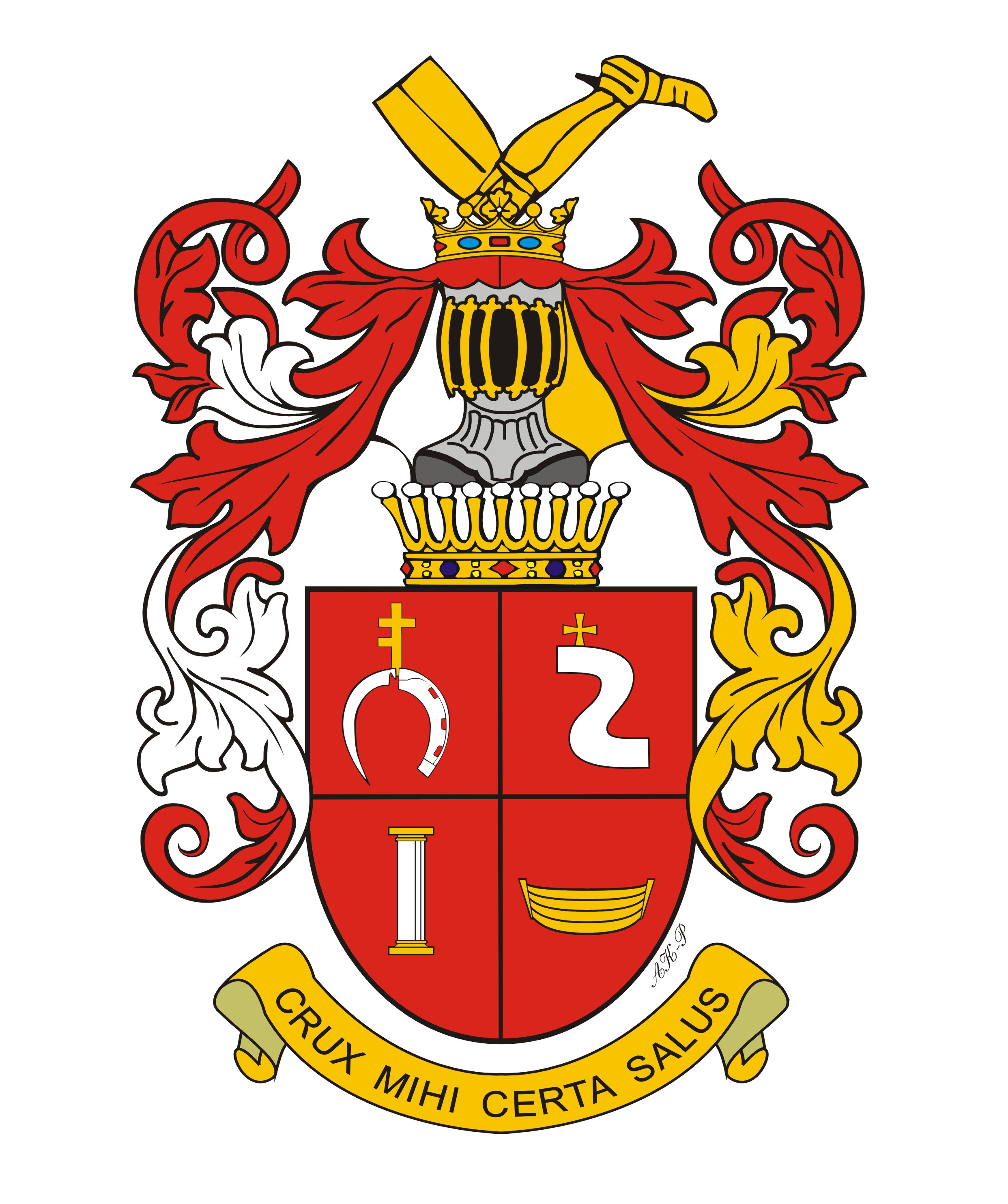 Herb hrabiów Czarneckich Prus III odm, wg Siebmachers Wappenbuch, Ergänzungsband Preussische Grafen VII Abth. 7.2, Leipzig 1886